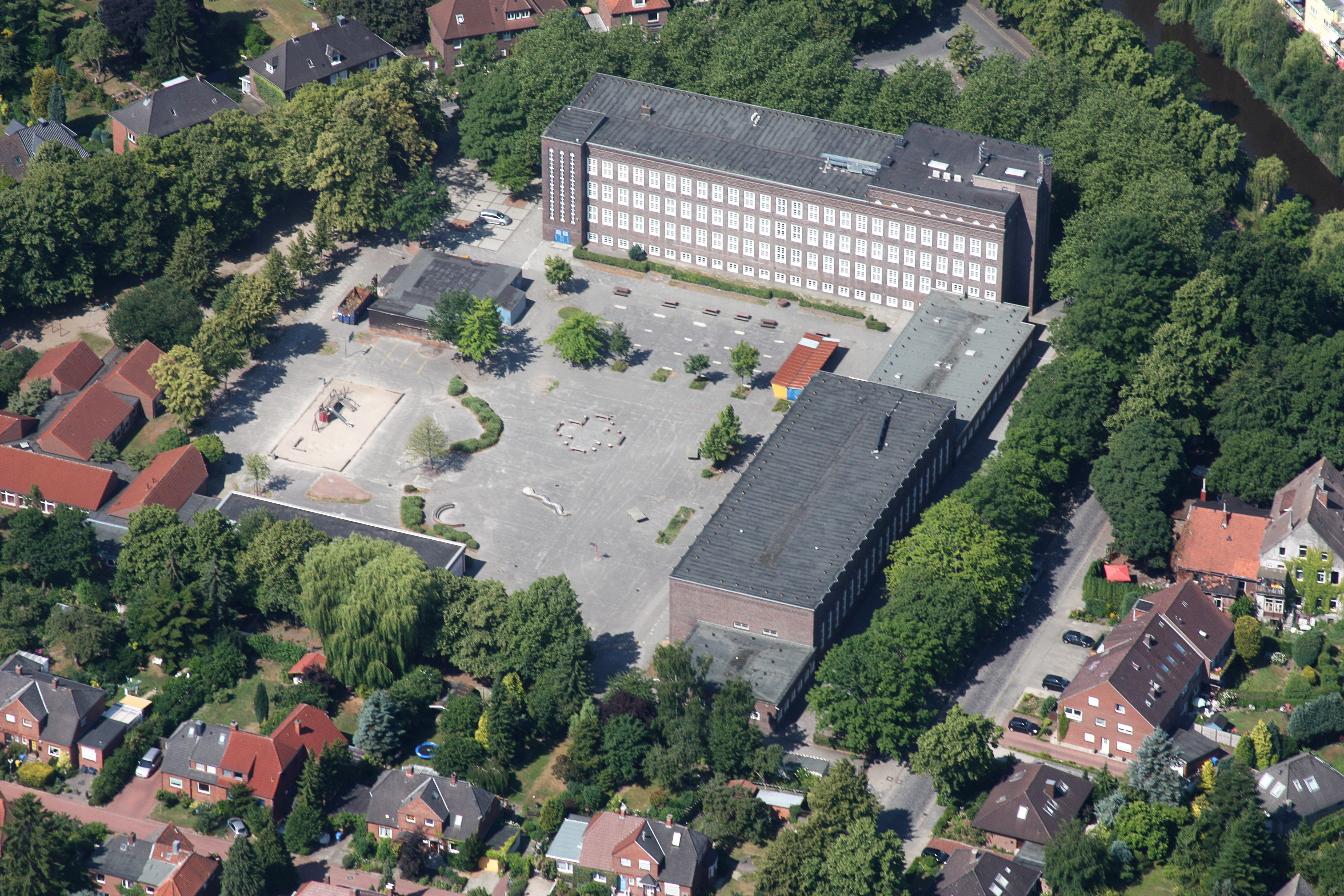 Flug über Emden; Flughöhe 1500 ft; Juli 2010; Originalfoto bearbeitet: Tonwertkorrektur und Bild geschärft mit Hochpassfilter